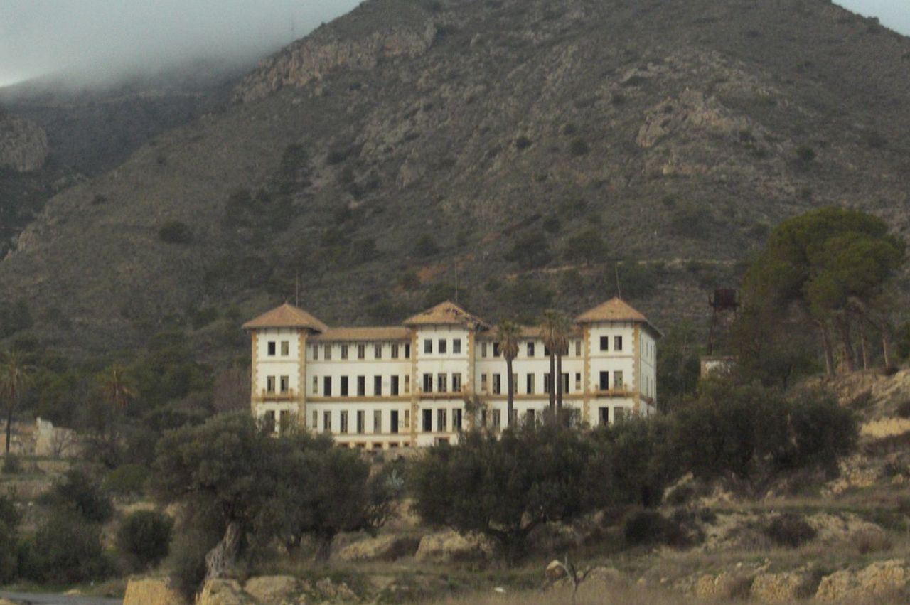 Aigües (l'Alacantí). Antic centre infantil de turbeculossos. Vista general.